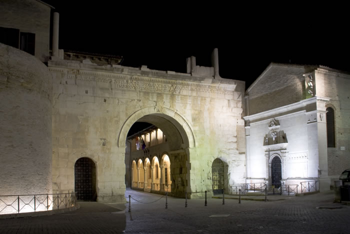 Arco di Augusto, Fano (PU) fotografato di notte.